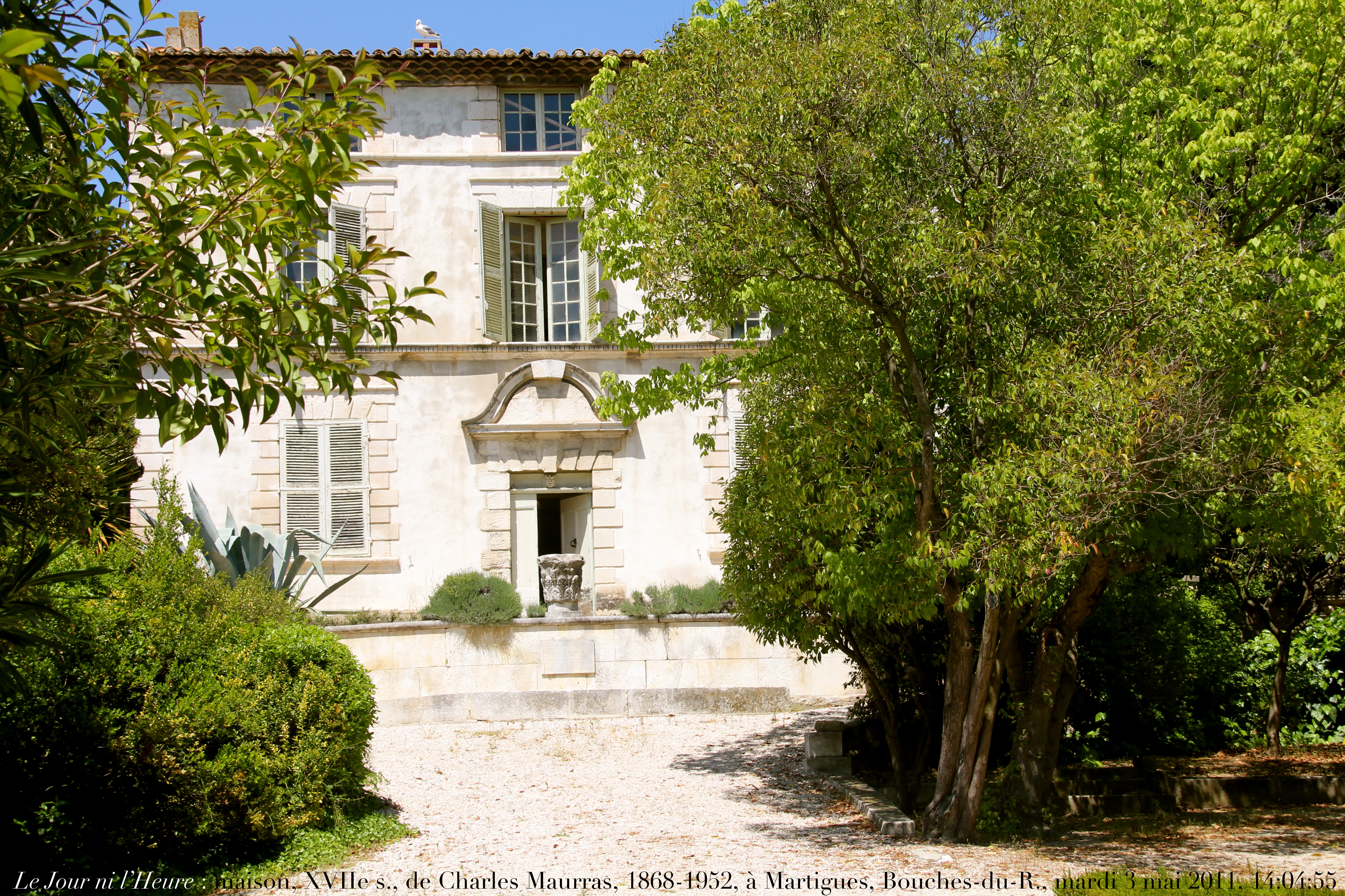 Maison (bastide), XVIIe s., dite du Chemin de Paradis, demeure de Charles Maurras, 1868-1952, à Martigues, Bouches-du-Rhône, Provence.